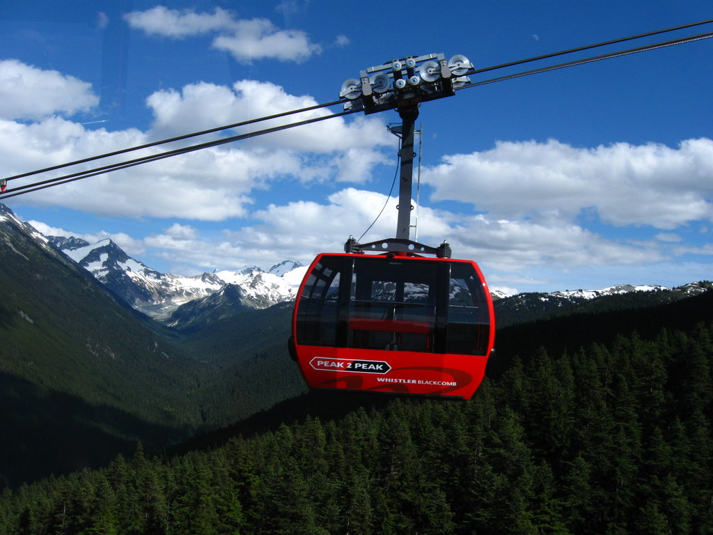 Téléphérique de Vancouver, 2009, ligne Whistler à Blackcomb